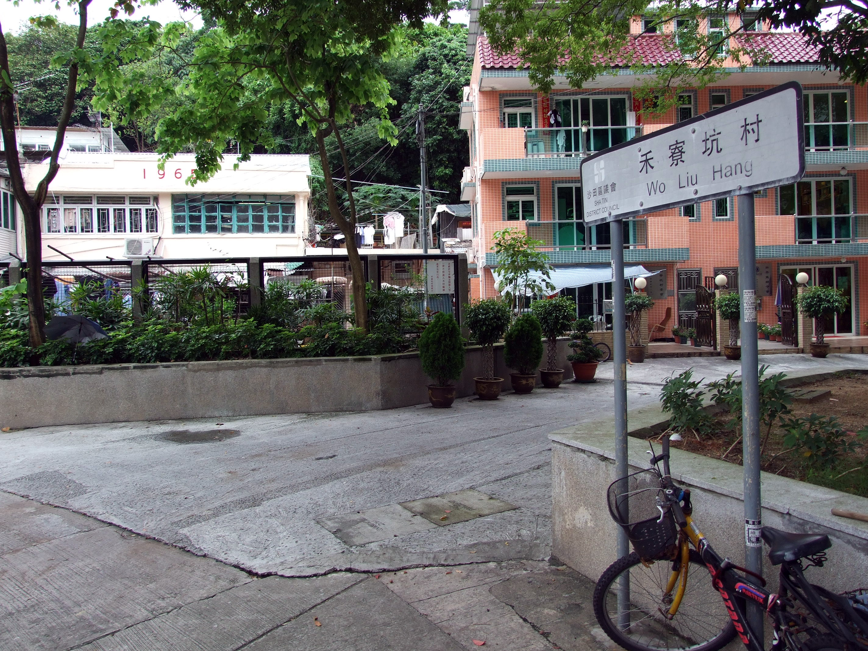 中文（香港）: 禾寮坑村